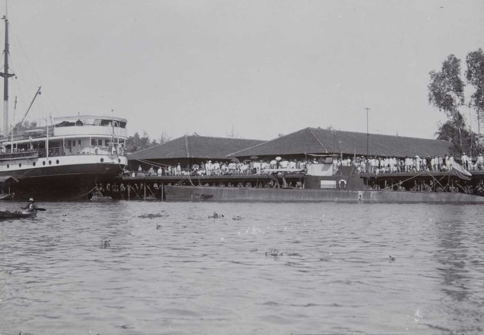 foto. Een onderzeeboot langs de kade aan de Martapura-rivier, Bandjermasin